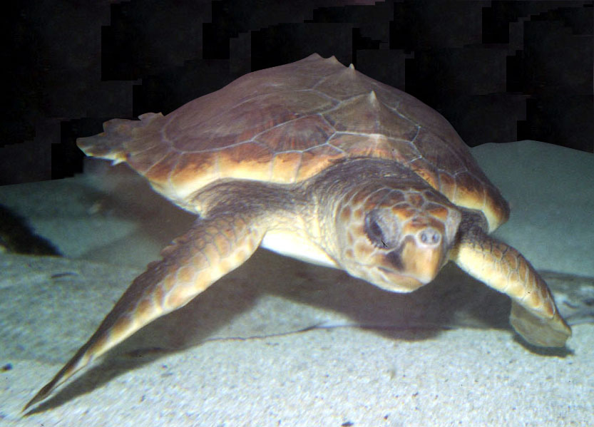 Tortue caouanne, Caretta caretta